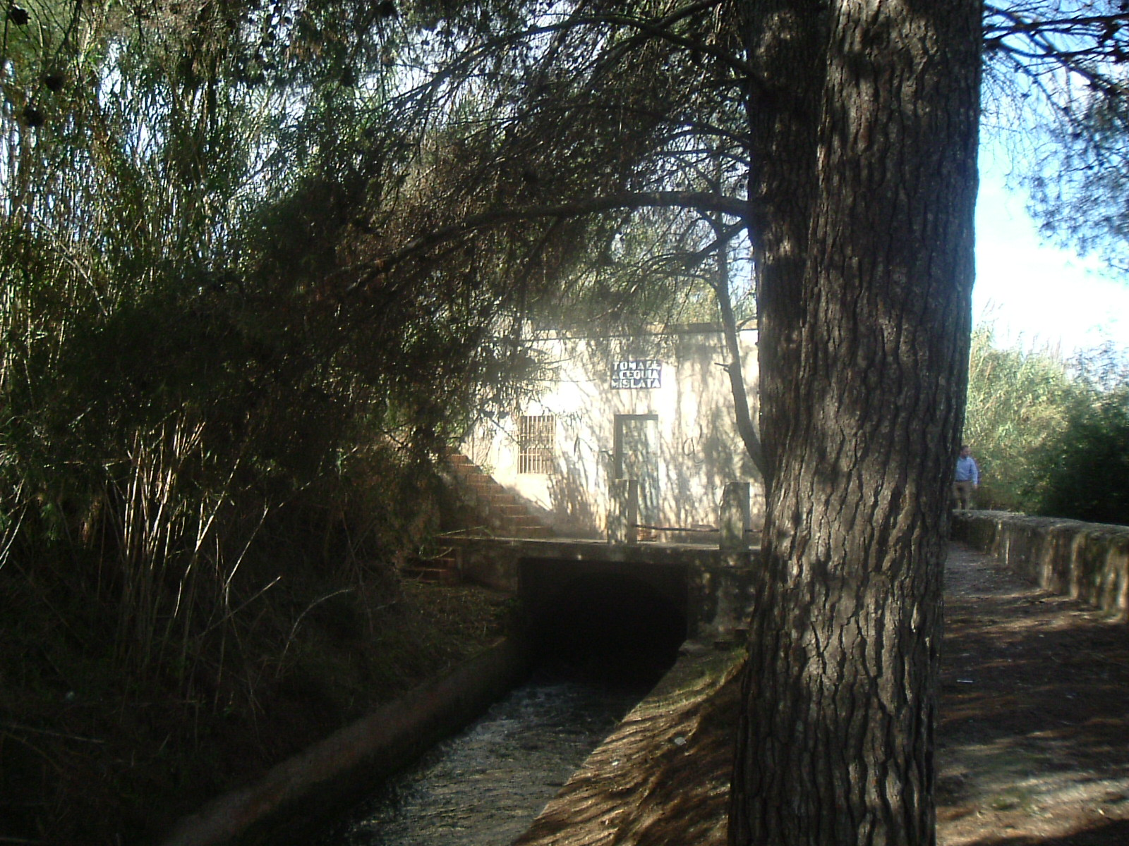 Vista de la toma de la acequia de Mislata en el río Turia (provincia de Valencia, España)